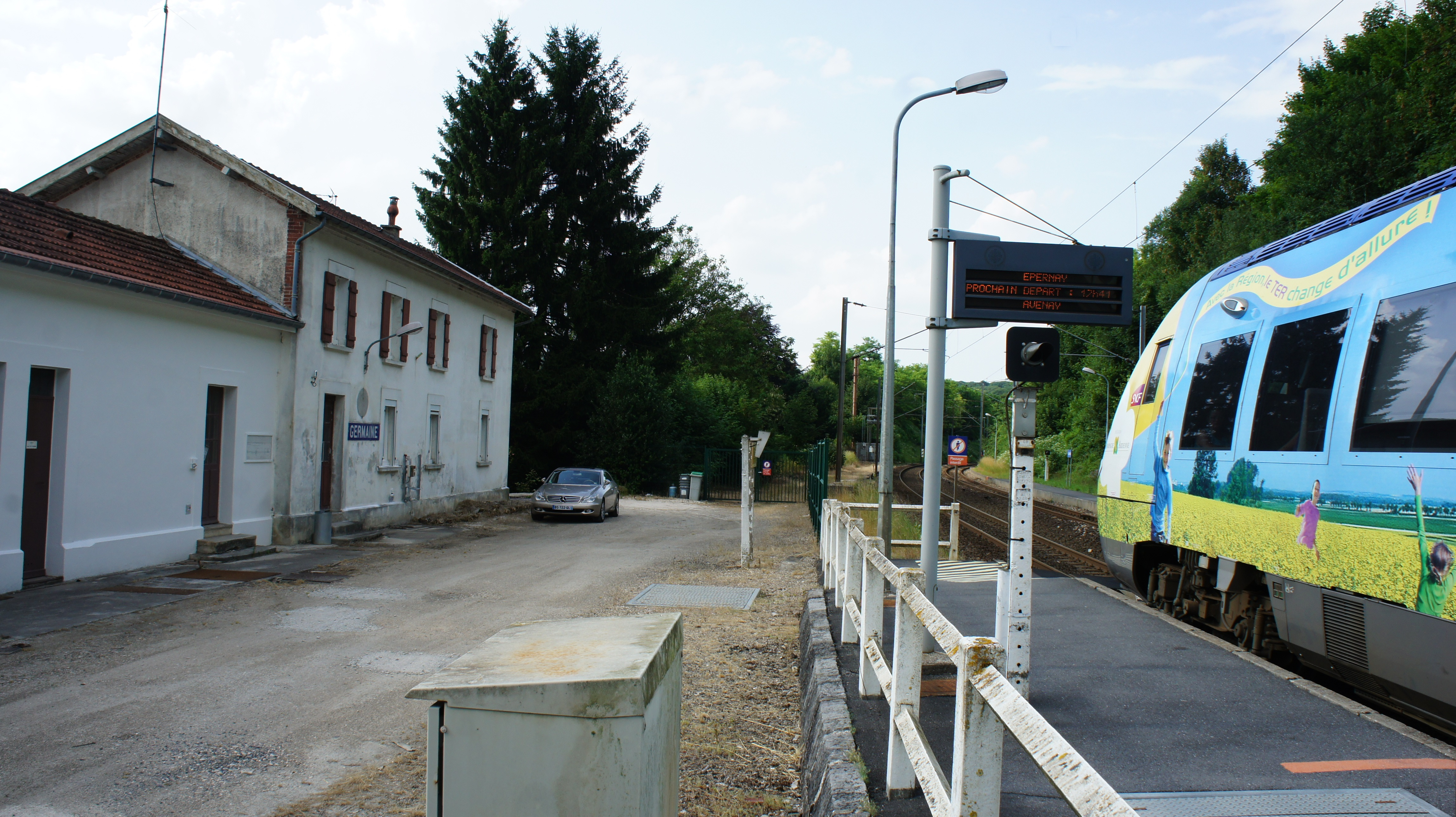 Une vue de .